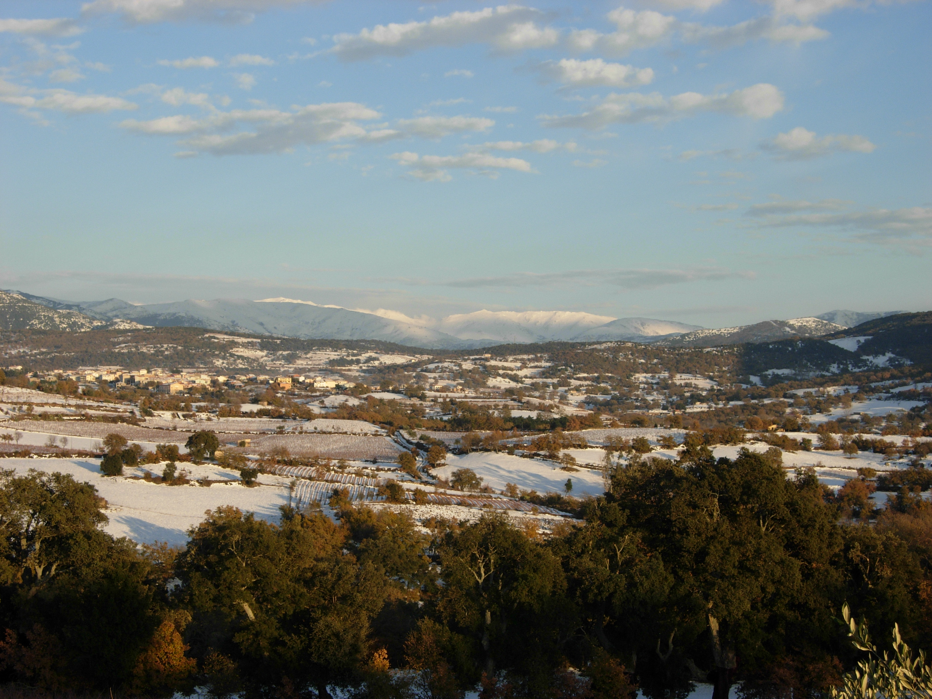 Atzara e i suoi vigneti sotto la neve.Sullo sfondo di Punta Lamarmora.